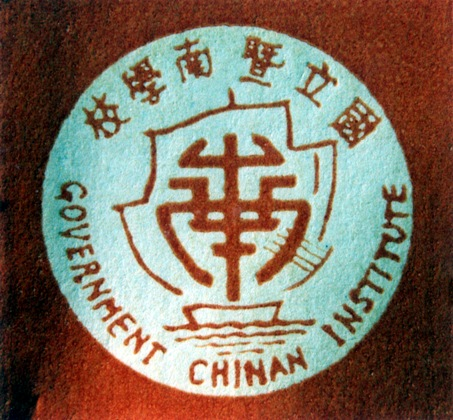 中文（台灣）: 國立暨南學校校徽